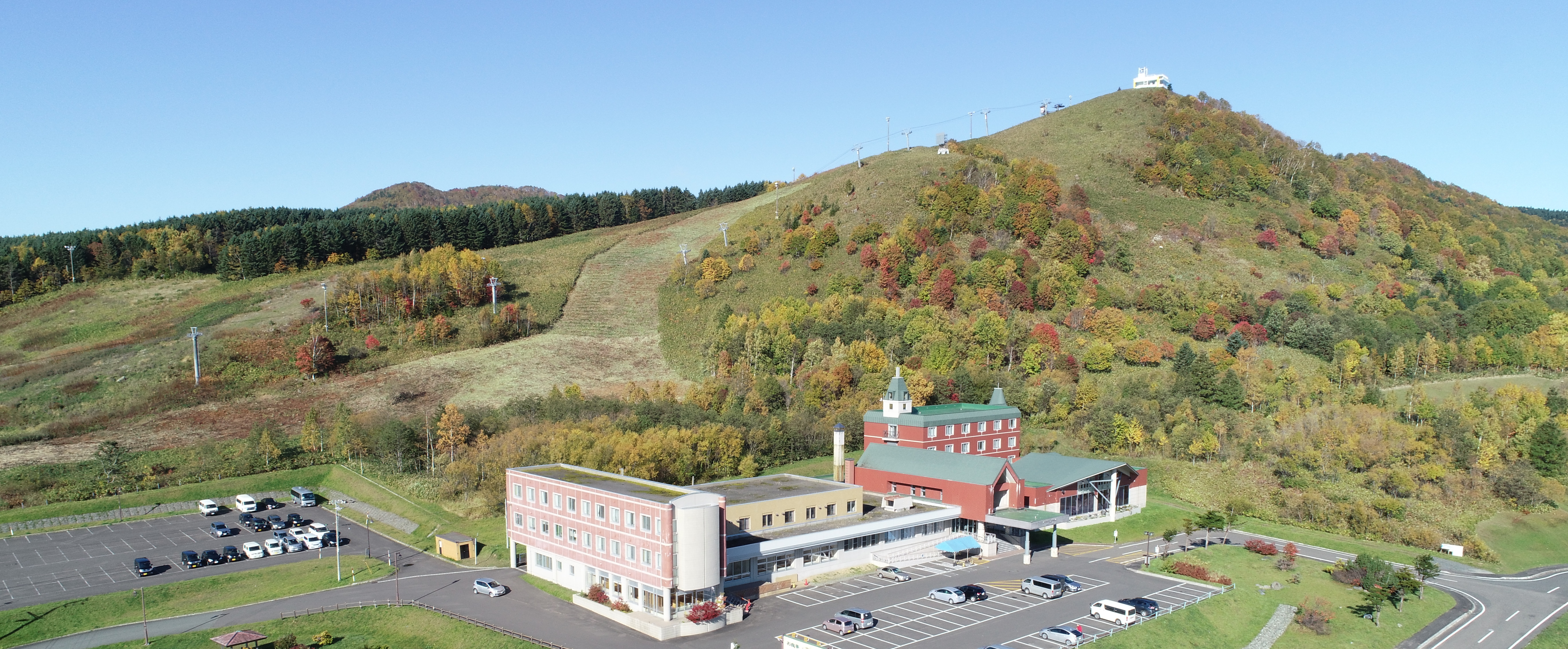 森と海に囲まれた自然豊かなオホーツク枝幸 オホーツクのおいしい空気とおいしい食事 ゆったりとした大浴場でくつろぎのひとときを